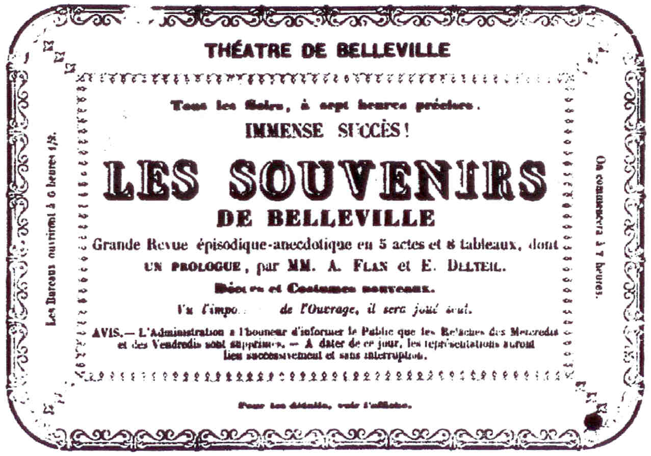 Annonce d'un spectacle au Théâtre de Belleville en 1859.